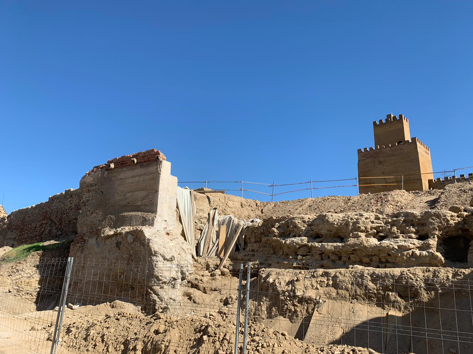 Muralla urbana